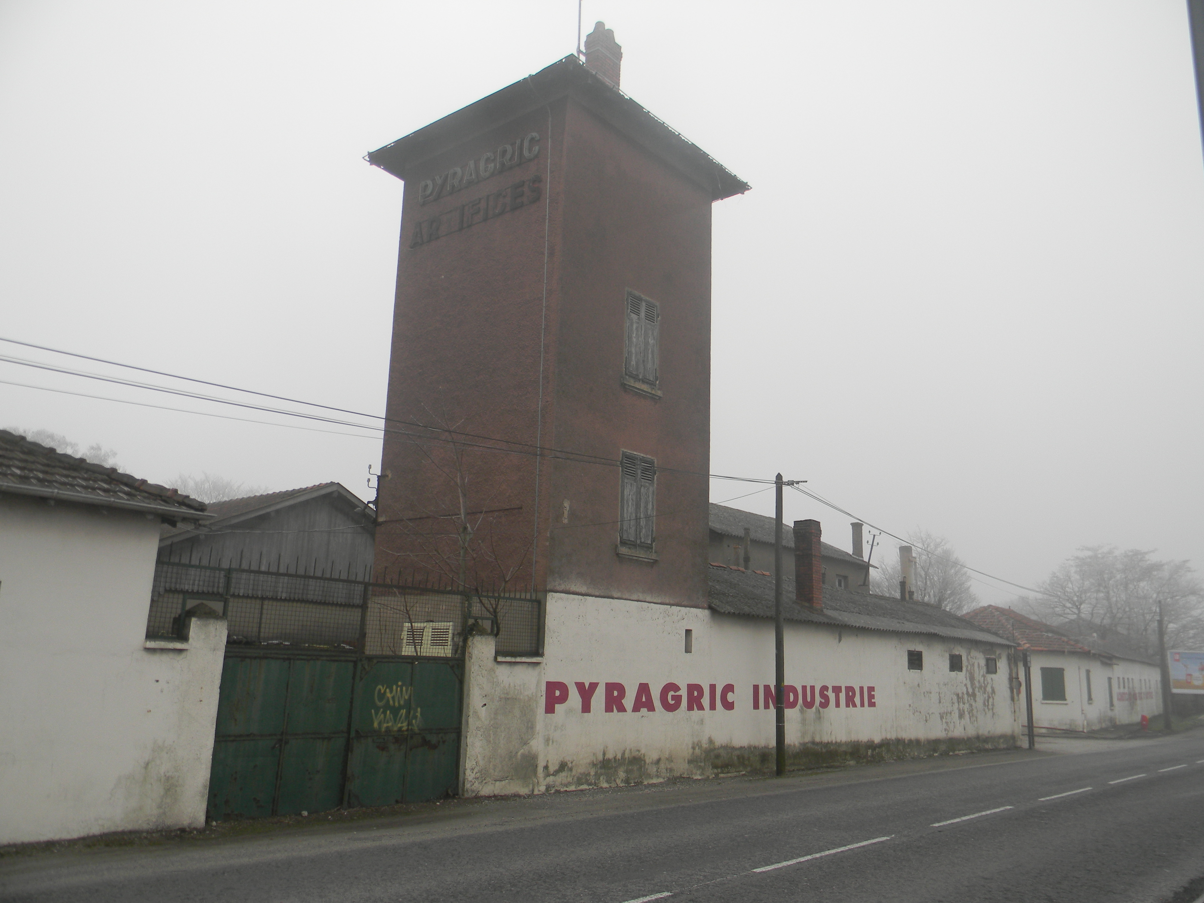 Entreprise de feux d'artifice Pyragric à Rillieux-la-Pape.